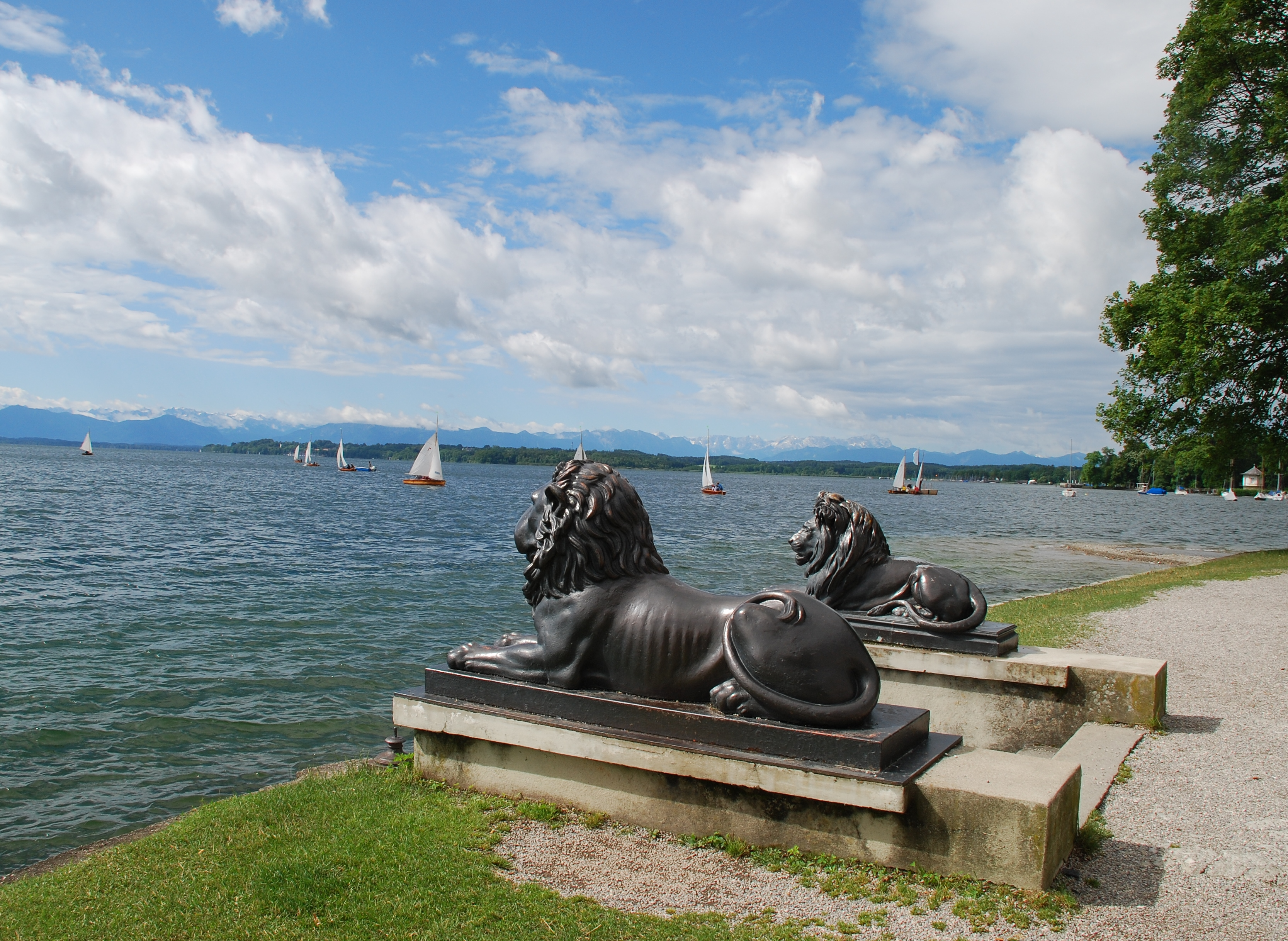 Tutzing am Starnberger See. Freitreppe mit flankierenden Löwen zum Seeufer in einer Parkanlage von Karl Effner aus der Zeit um 1870.